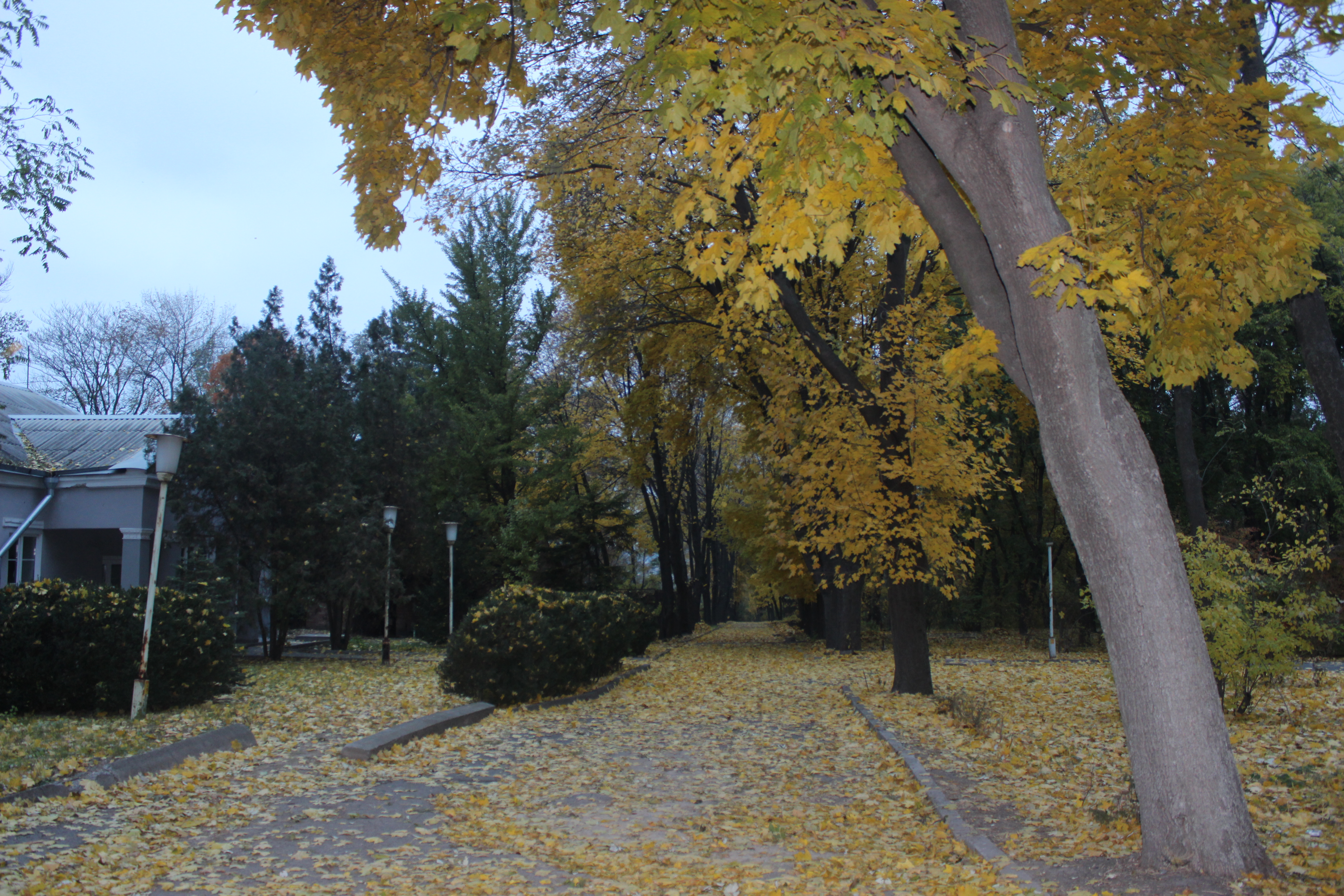 Ботанічний сад Дніпропетровськкого національного університету, м. Дніпропетровськ, пр. Гагаріна, 72